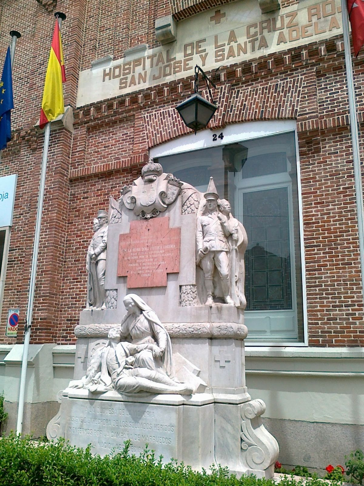 Monumento a la duquesa Victoria en la fachada del hospital de la Cruz Roja San José y Santa Adela en Madrid. Tiene la leyenda "A la Duquesa de la Victoria, bienhechora de los soldados heridos y enfermos por la campaña de Marruecos, la Nación agradecida". Obra de Julio González Pola y García. Existe una réplica del monumento en el Parque Genovés de Cádiz.